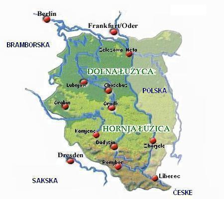 Dolnoserbski: Sorbin map of Lusatia